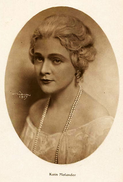 Karin Molander